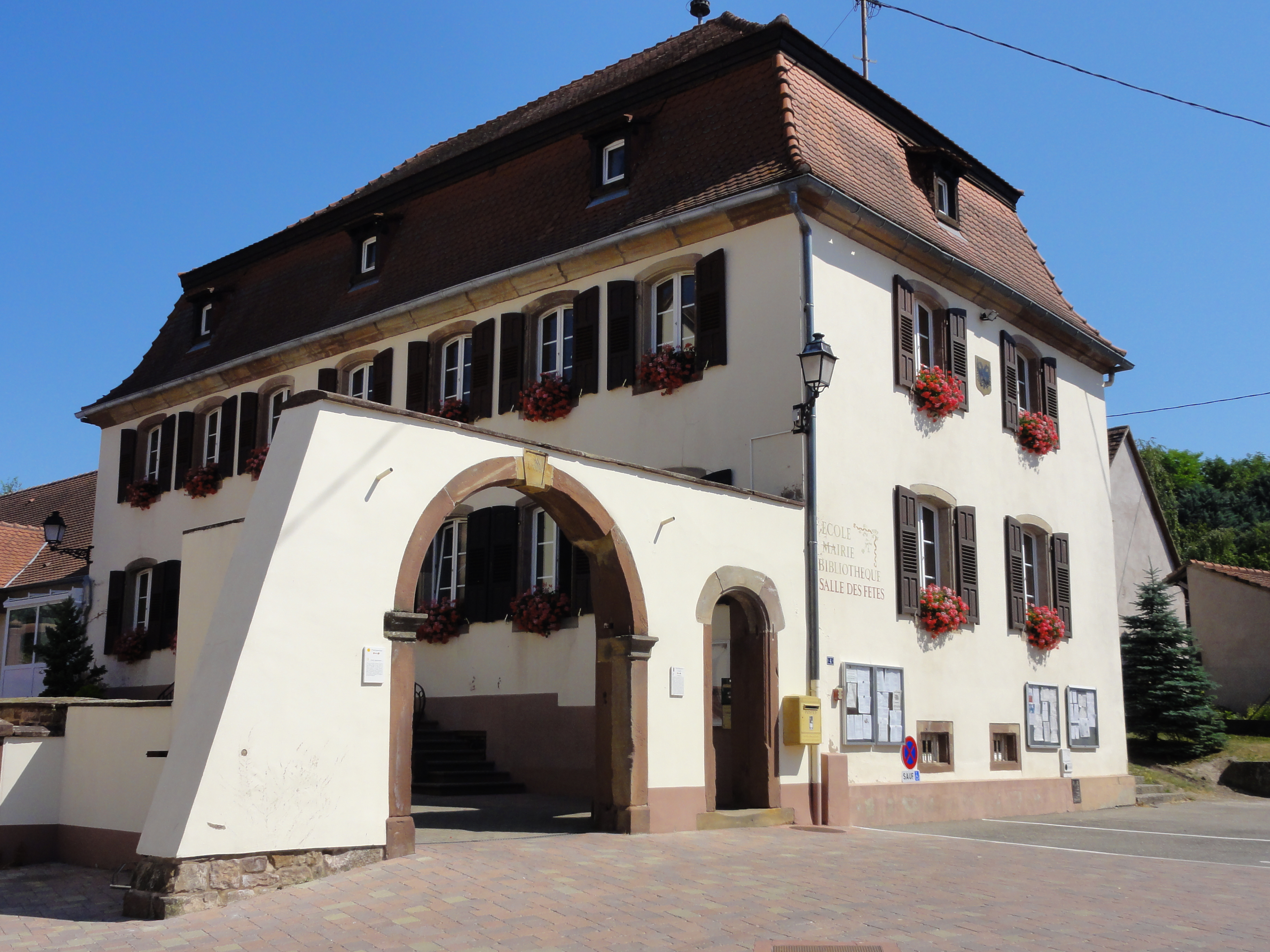 Alsace, Bas-Rhin, Presbytère (XVIIIe), actuellement mairie. .